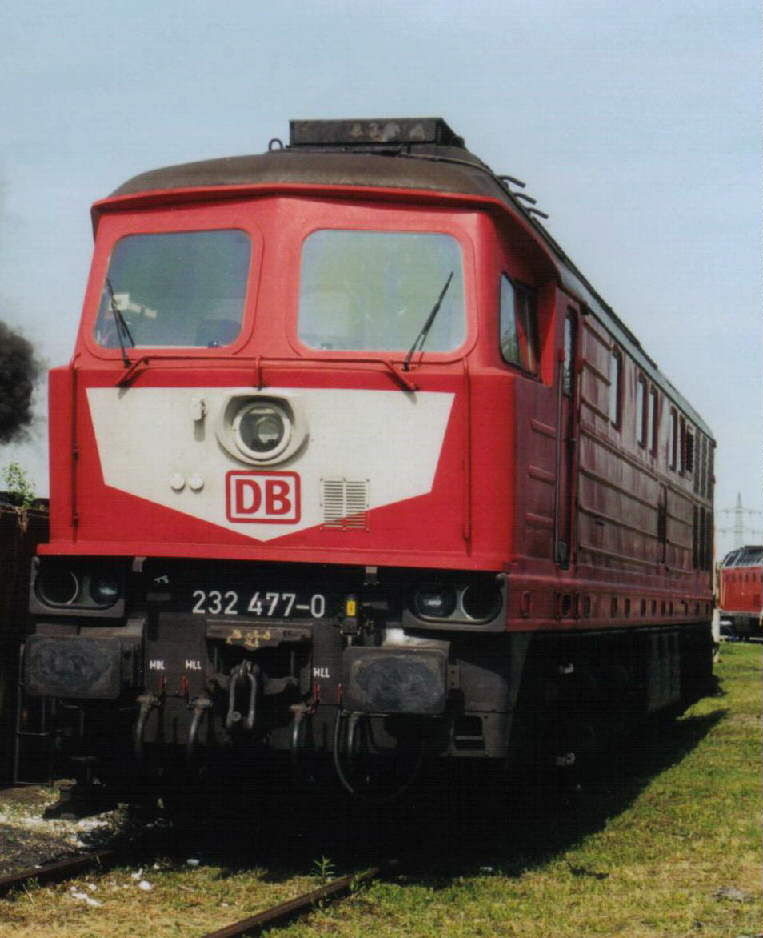 DB 232 477 bei einer Ausstellung in Weimar.